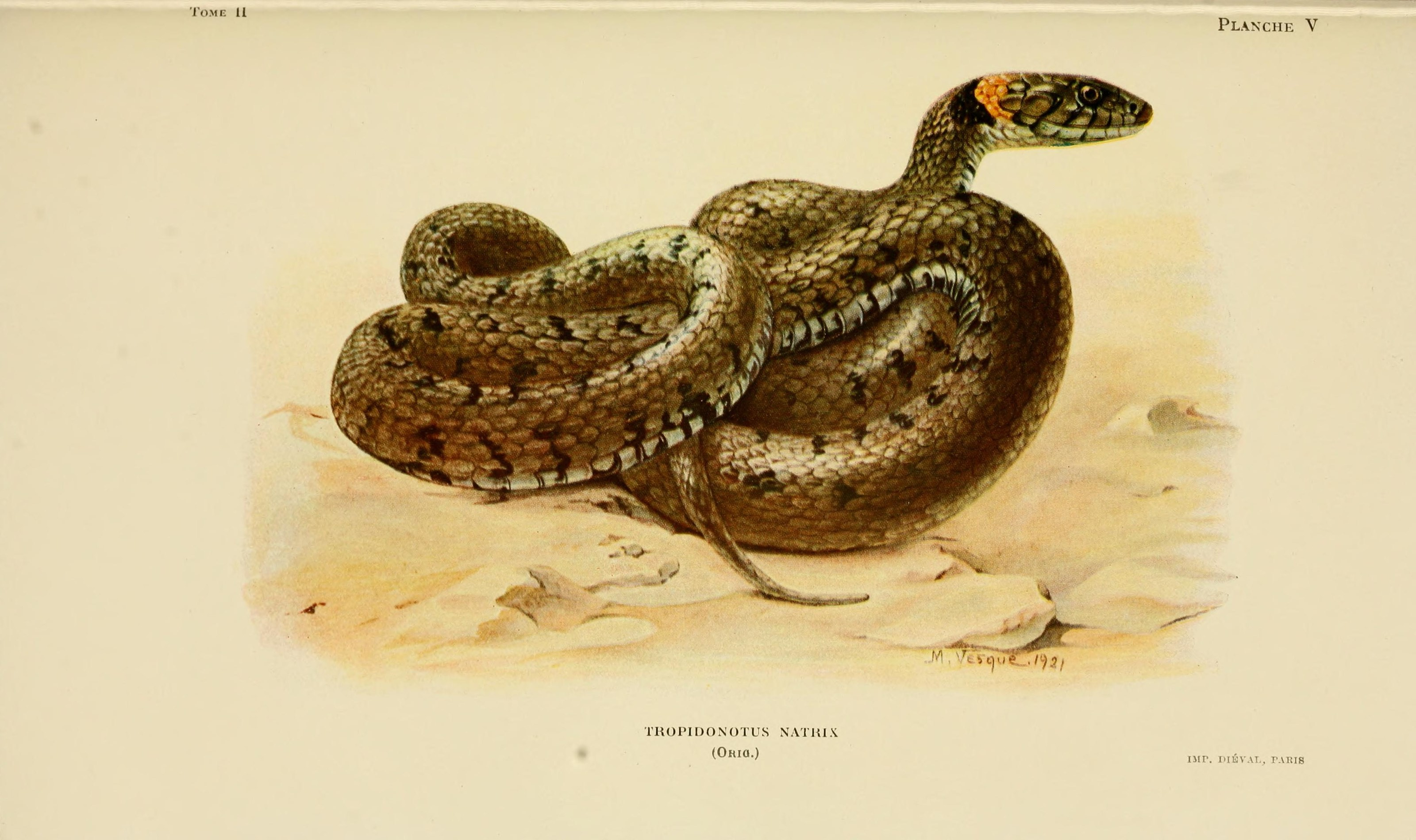 o 2 y. o o -'